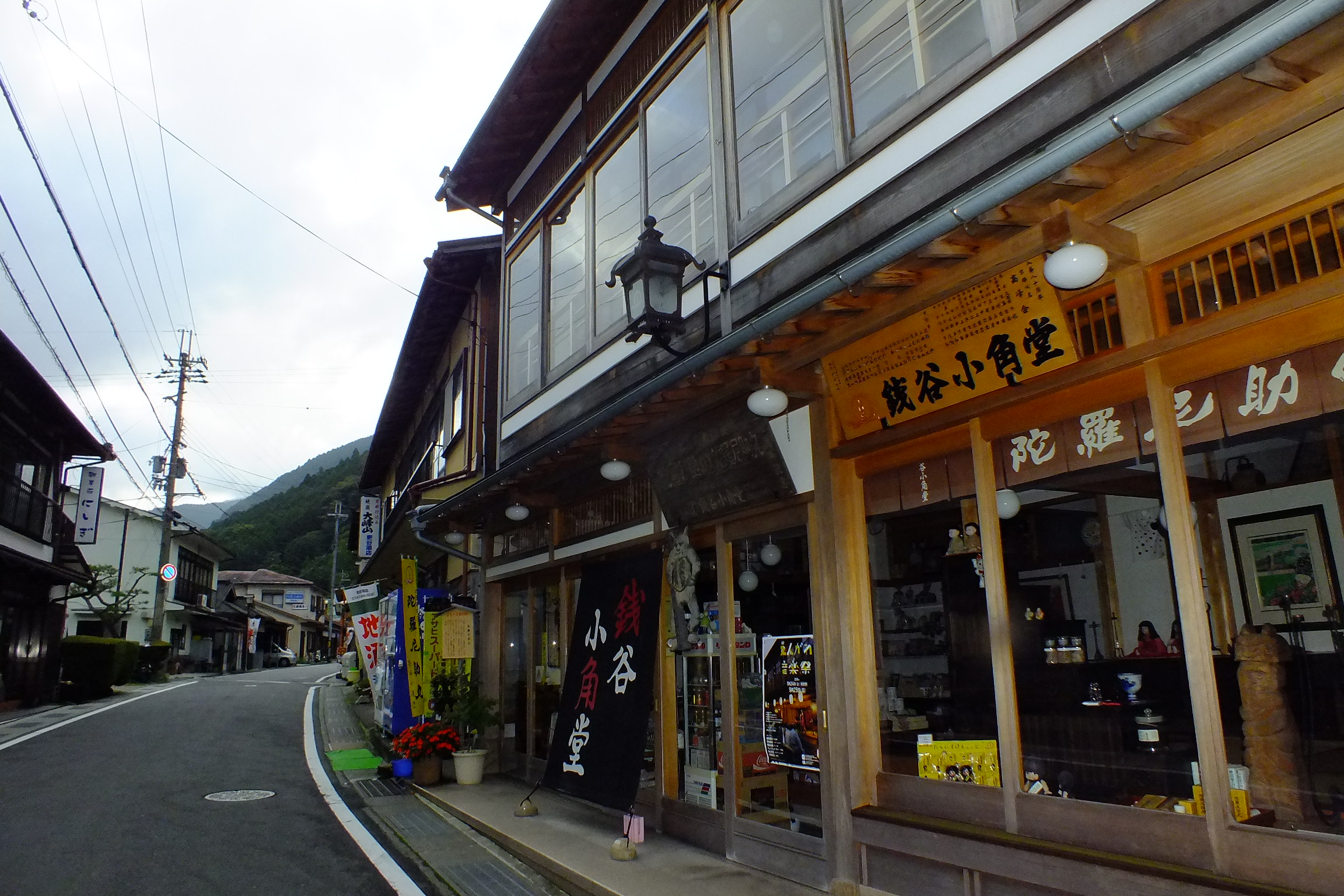 2016-09-09 Dorogawa-Onsen, Tenkawa, Nara,洞川温泉